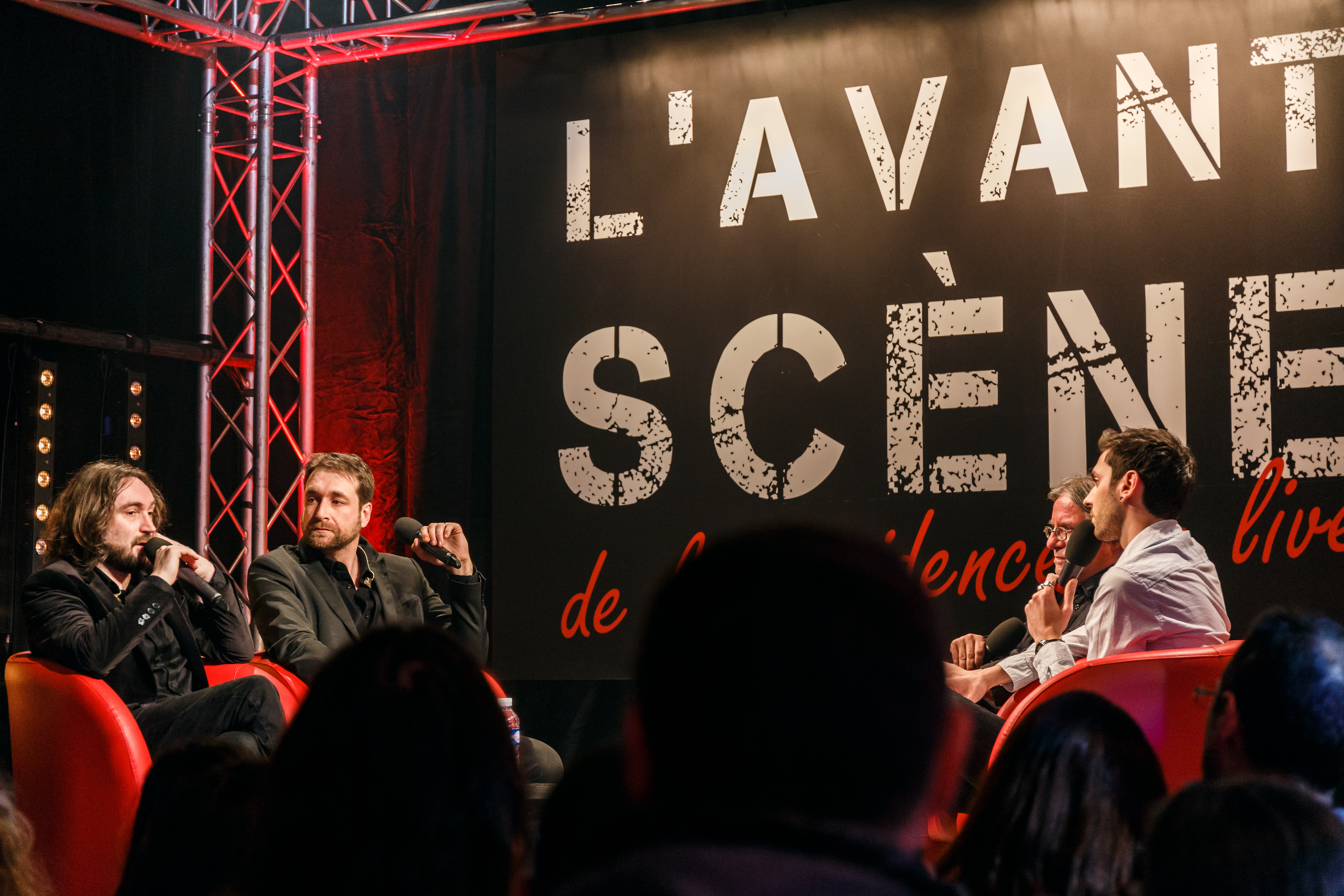 Premier concert du groupe Matmatah suite à sa reformation en 2016 à l'occasion de l'émission L'Avant-Scène tournée à l'Espace Avel Vor de Plougastel le 16 février 2017.